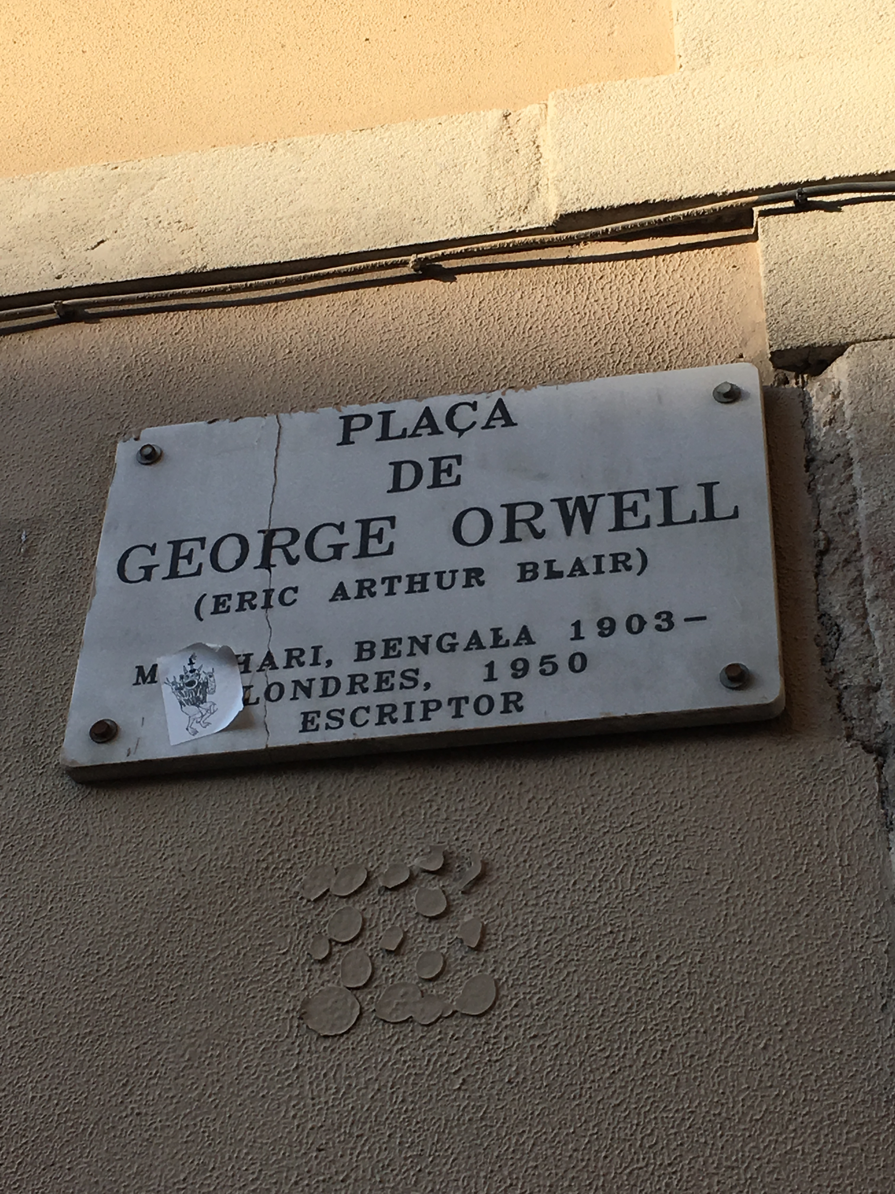 Placa de George Orwell in Barcelona